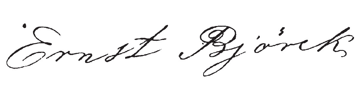 Ernst Björcks (1838–1868) namnteckning.